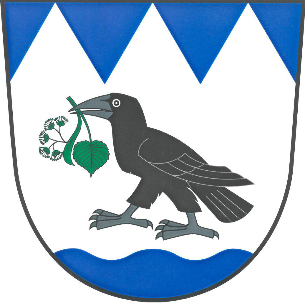 Znak obce Víska (okres Havlíčkův Brod)